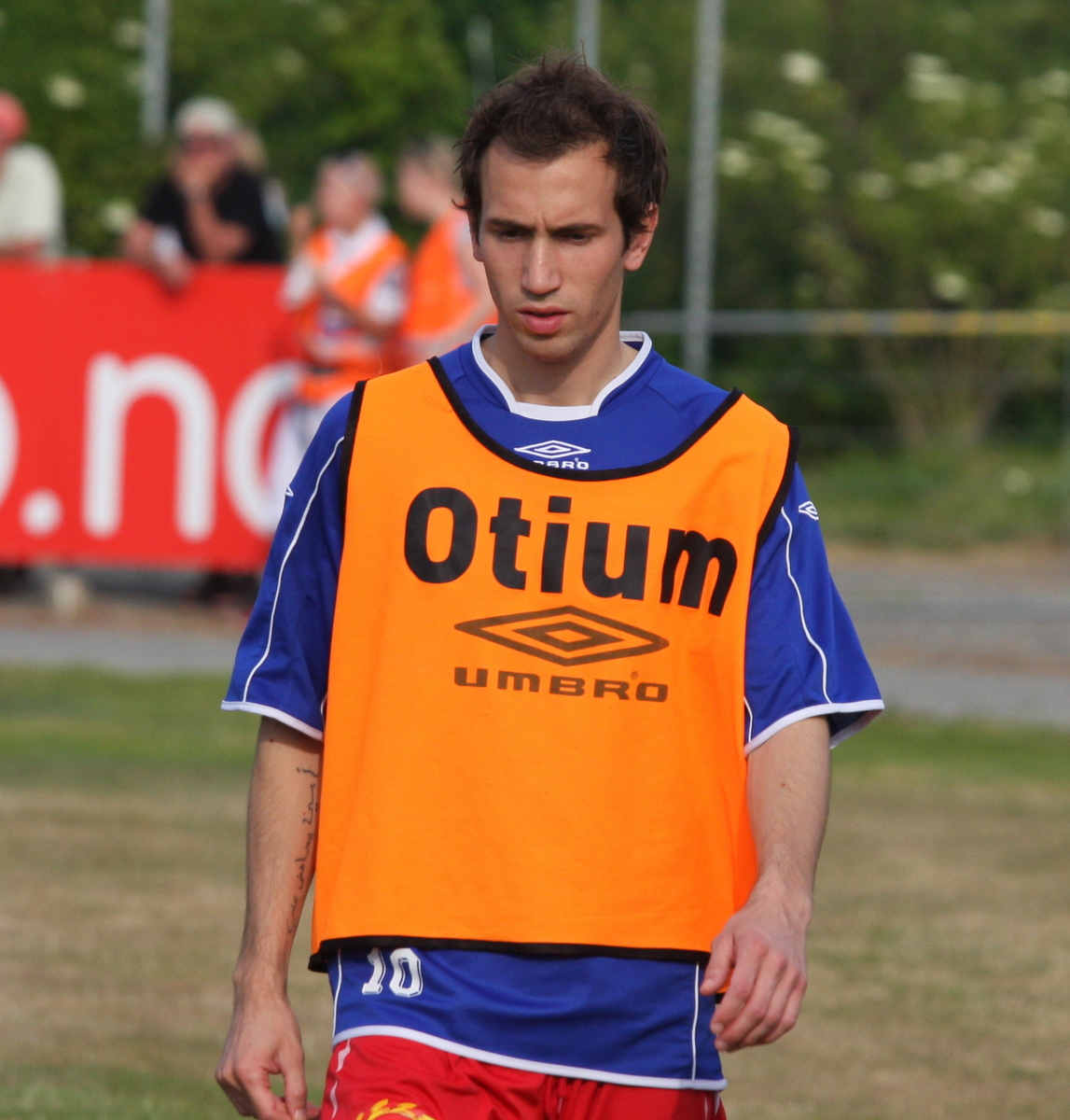 Espen Minde